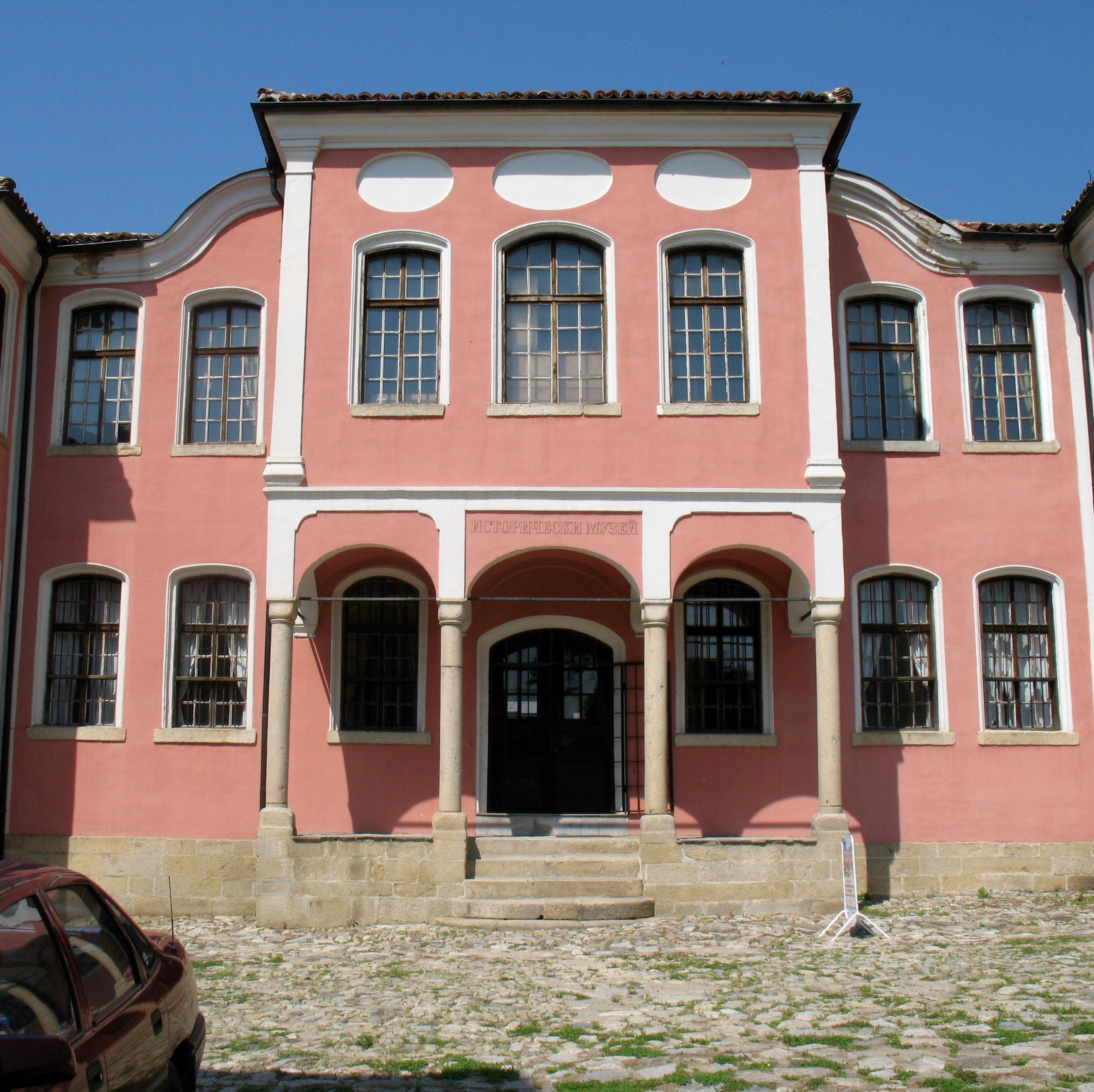 „Исторически музей, Карлово“